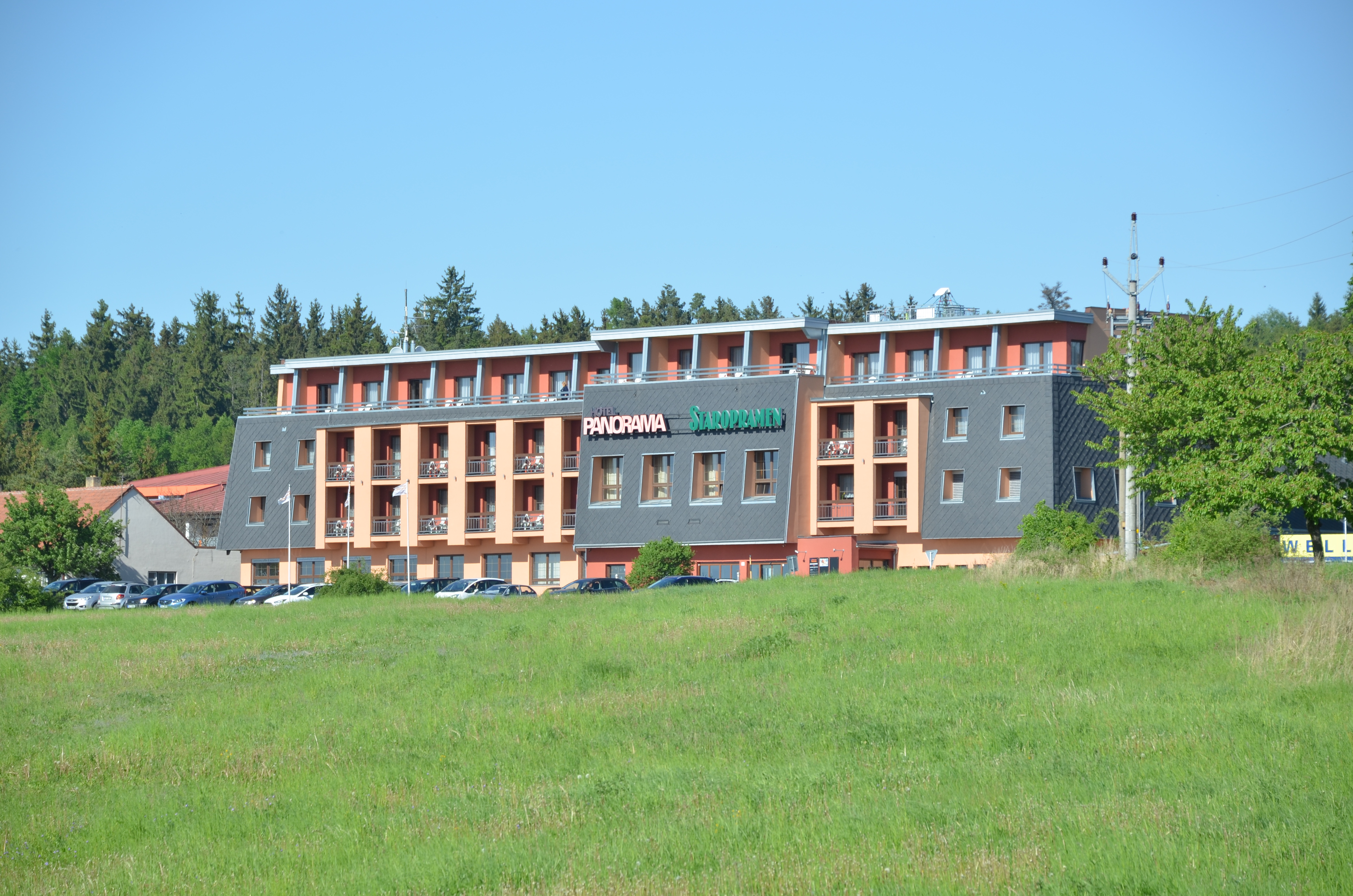 Hotel Panorama, dominanta obce Češkovice